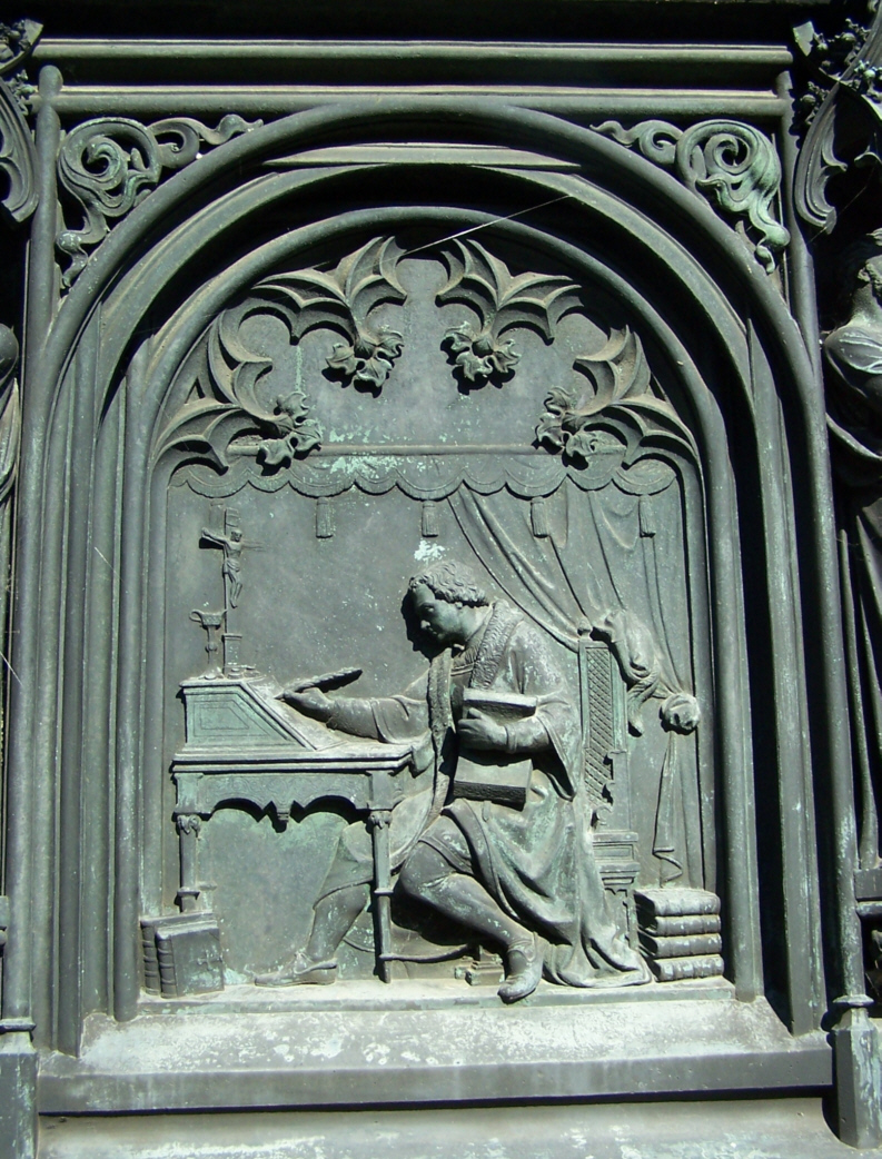 Die Motivplatte Junker Jörg auf der Wartburg - am Lutherdenkmal in Möhra.